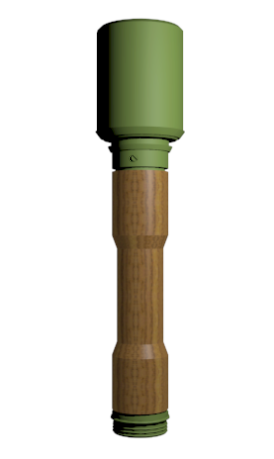 German Model 24 hand grenade.